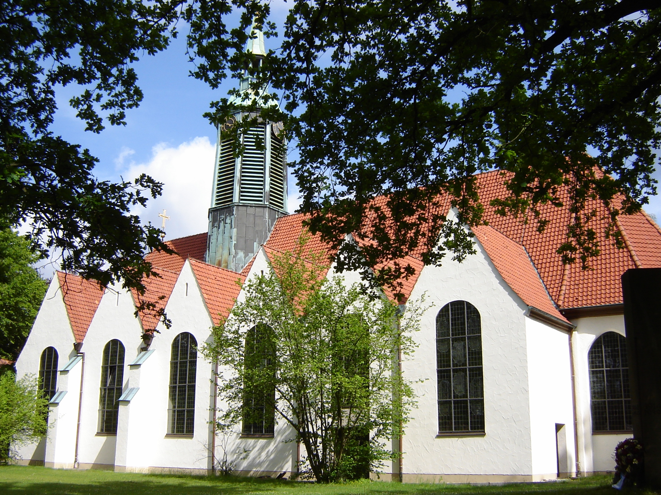 Peter-Paul-Kirche in Hermannsburg (Niedersachsen)